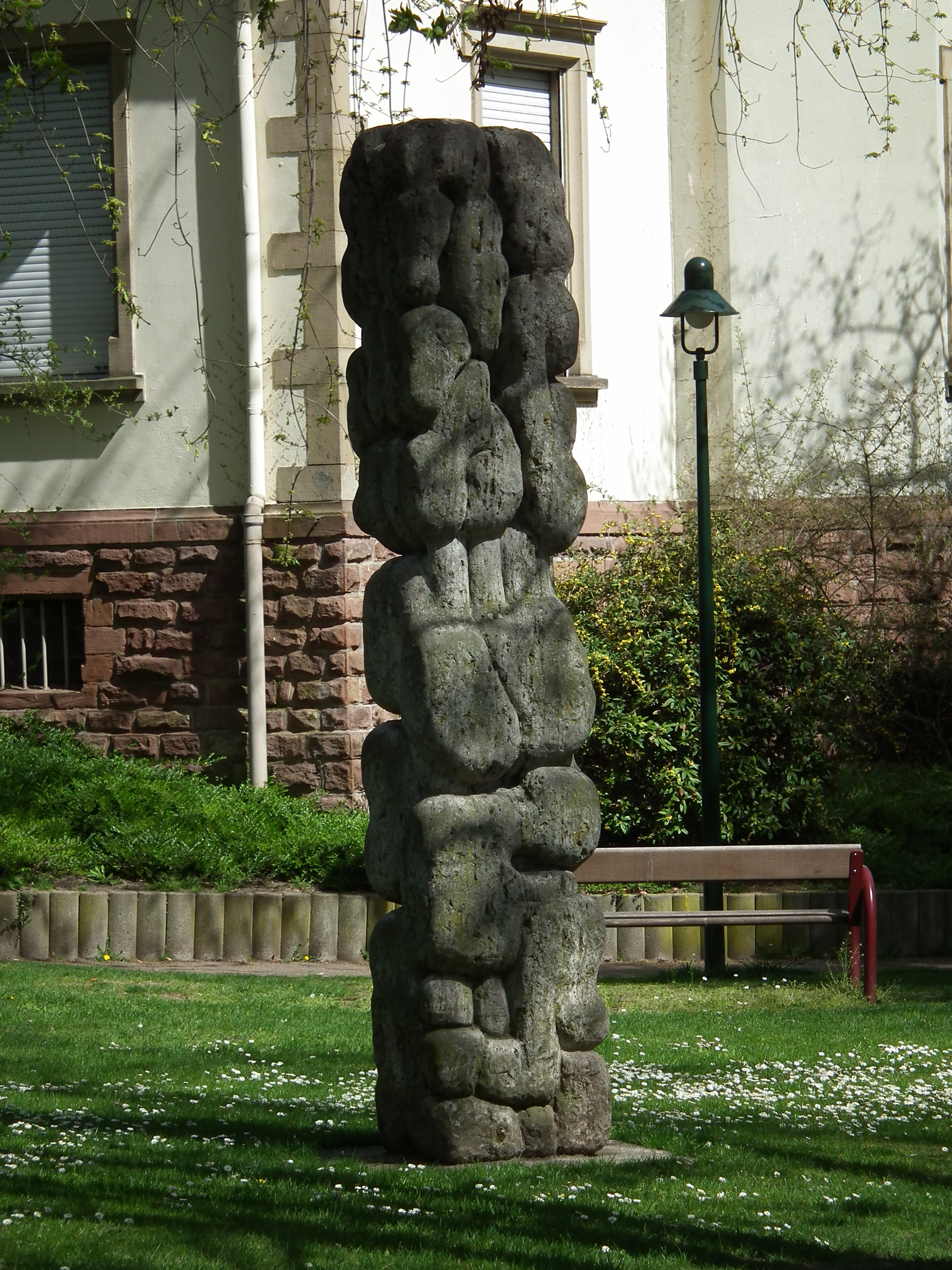 "Wachsendes Leben" (1956), Stele aus Muschelkalkstein von László Szabó, 1976 aufgestellt im Kulturhausgarten (heute Amarante Anlage) in Wiesloch (Baden-Württemberg, Deutschland)